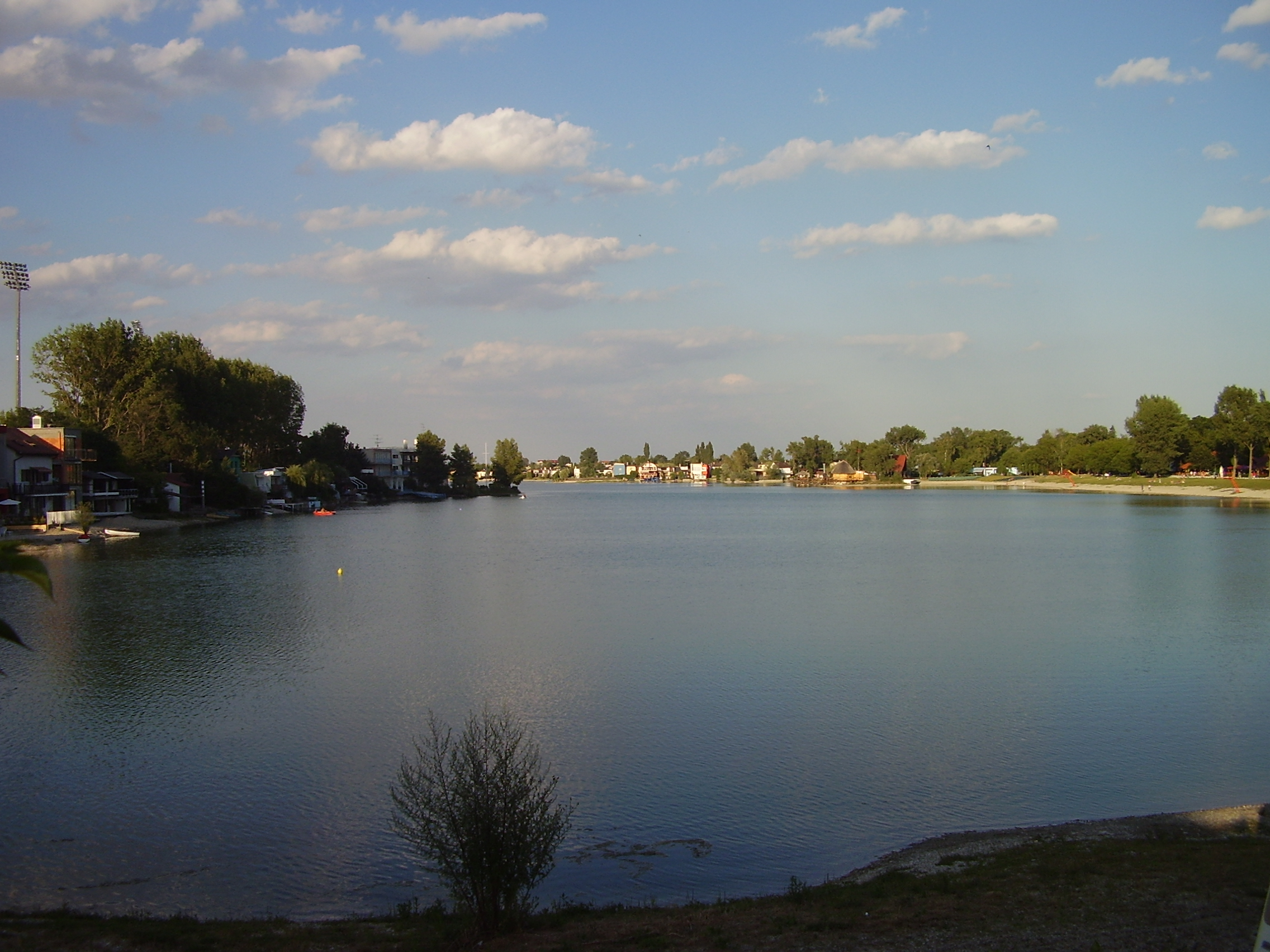 Senec